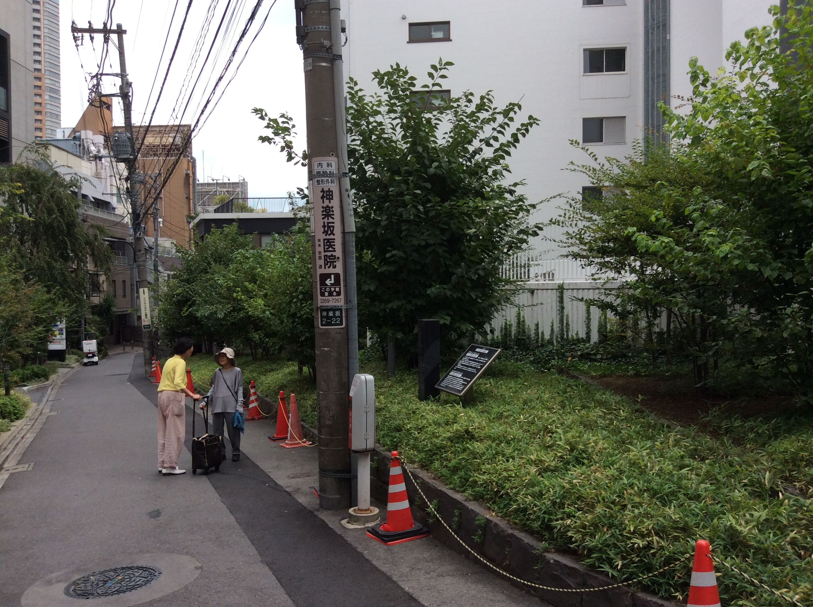 東京都新宿区神楽坂２丁目 泉鏡花旧居跡